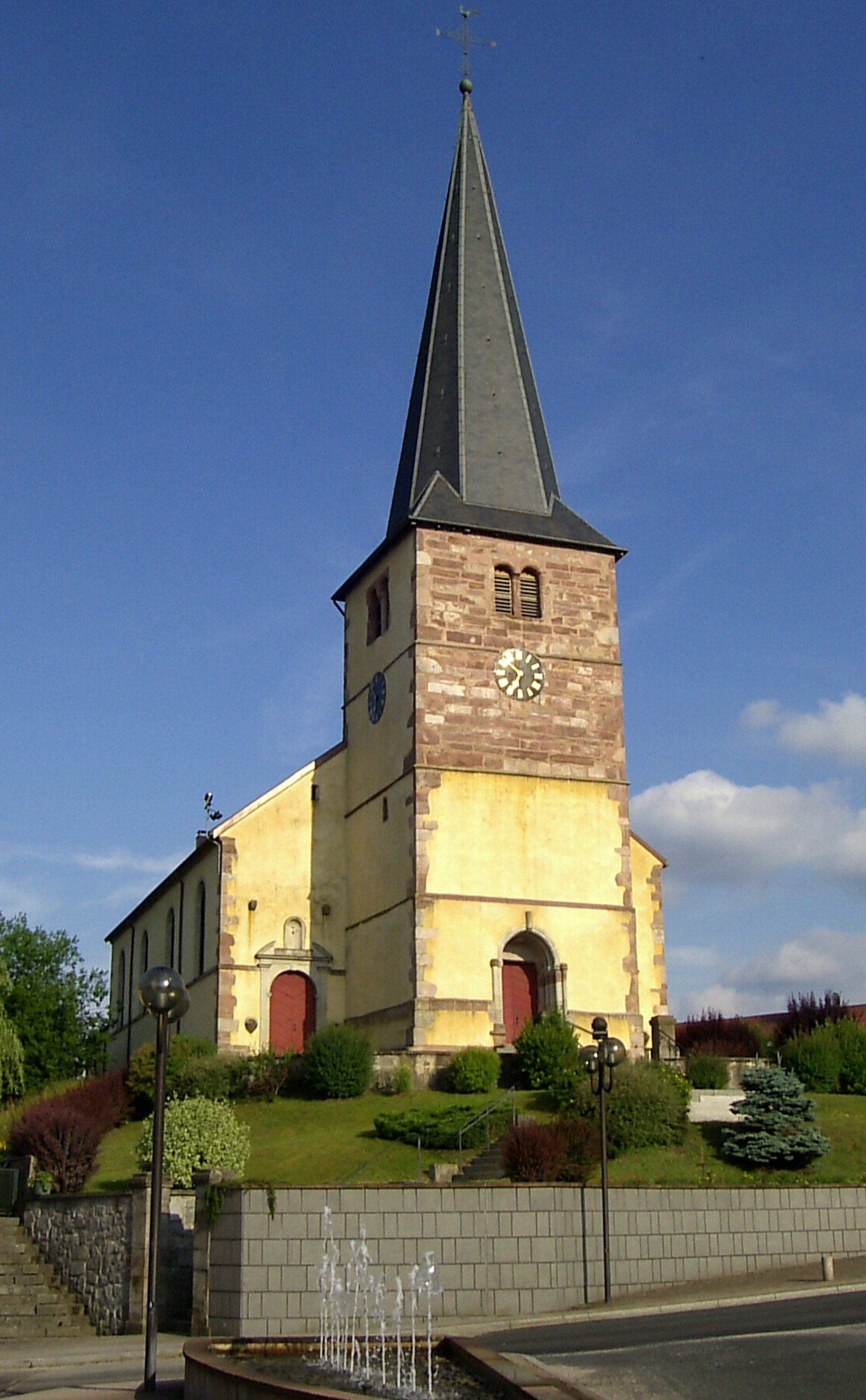 L'église Saint-Remy-et-Saint-Blaise á Ramonchamp